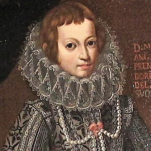 il dipinto ritrae le sembianze di Maria Polissena Landi (1608-1679), principessa di Borgotaro, marchesa di Bardi